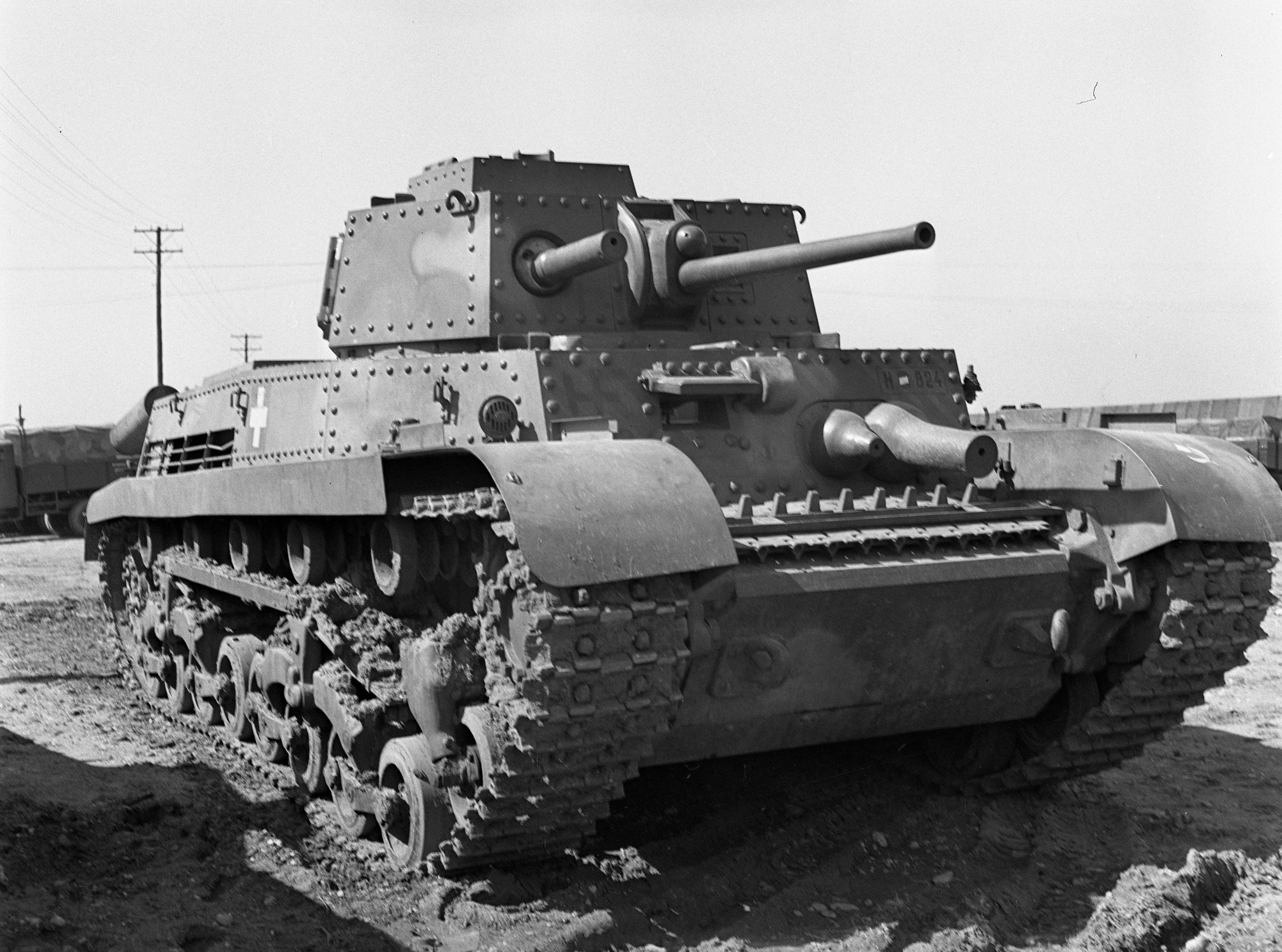 Mátyásföld, Újszász utca 41-43. Magyar Királyi Honvéd gépkocsiszertár udvara, Turán típusú harckocsi. Location: Hungary, Budapest XVI. Tags: Budapest, tank, Hungarian brand, military Title: Mátyásföld, Újszász utca 41-43. Magyar Királyi Honvéd gépkocsiszertár udvara, Turán típusú harckocsi.